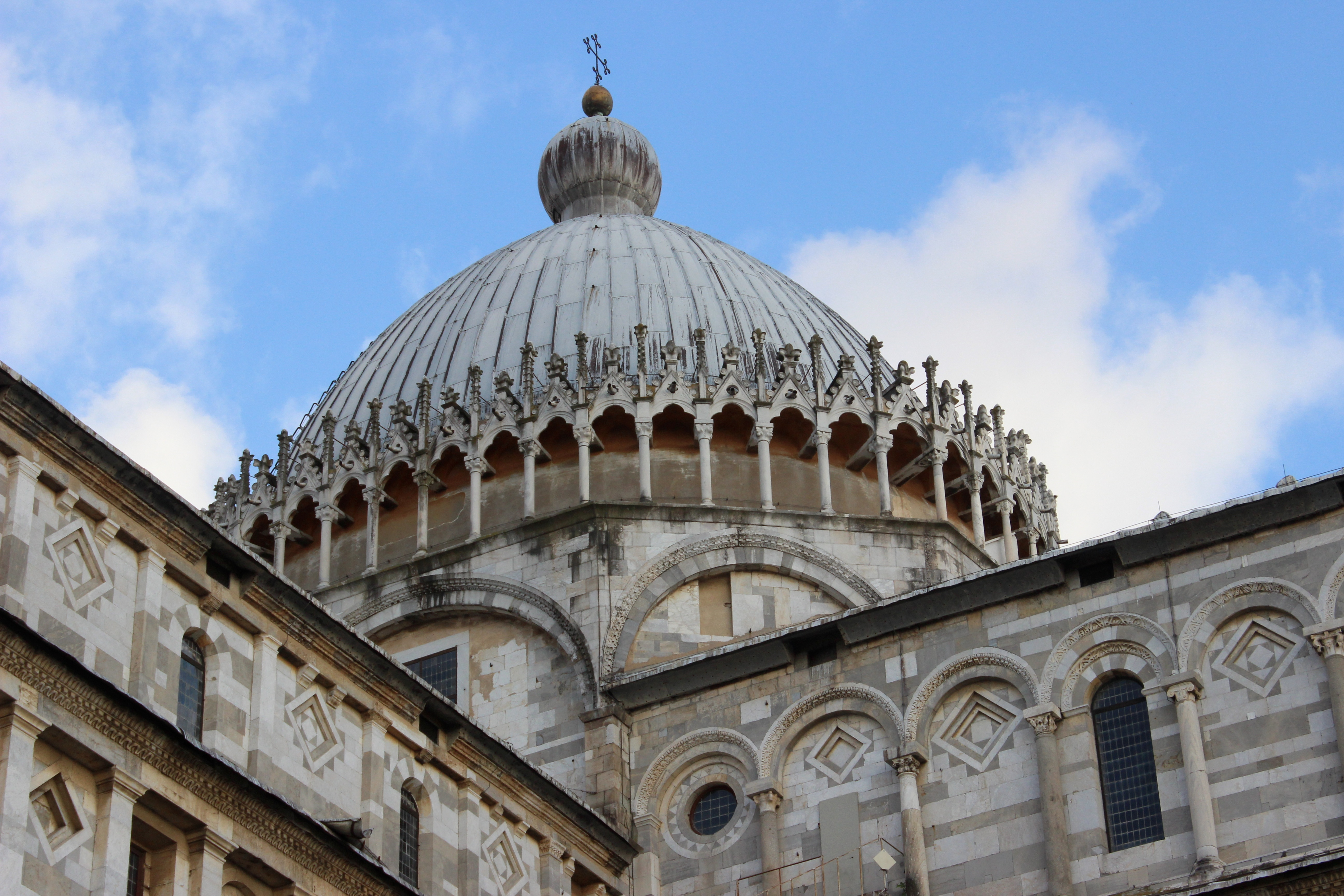 Cúpula de la catedral de Pisa